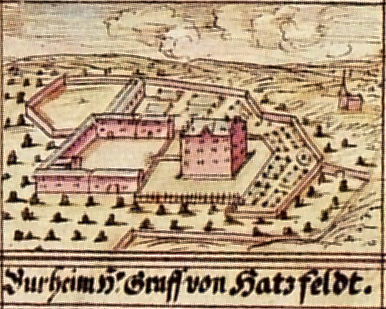 Lavierte Federzeichnung der Burg Bourheim in Jülich aus dem Codex Welser